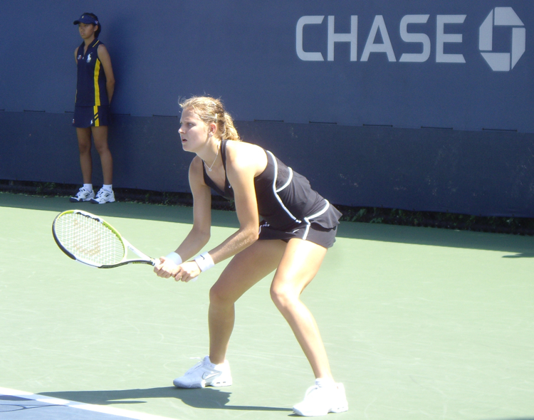 Lucie Safarova at US Open 2007